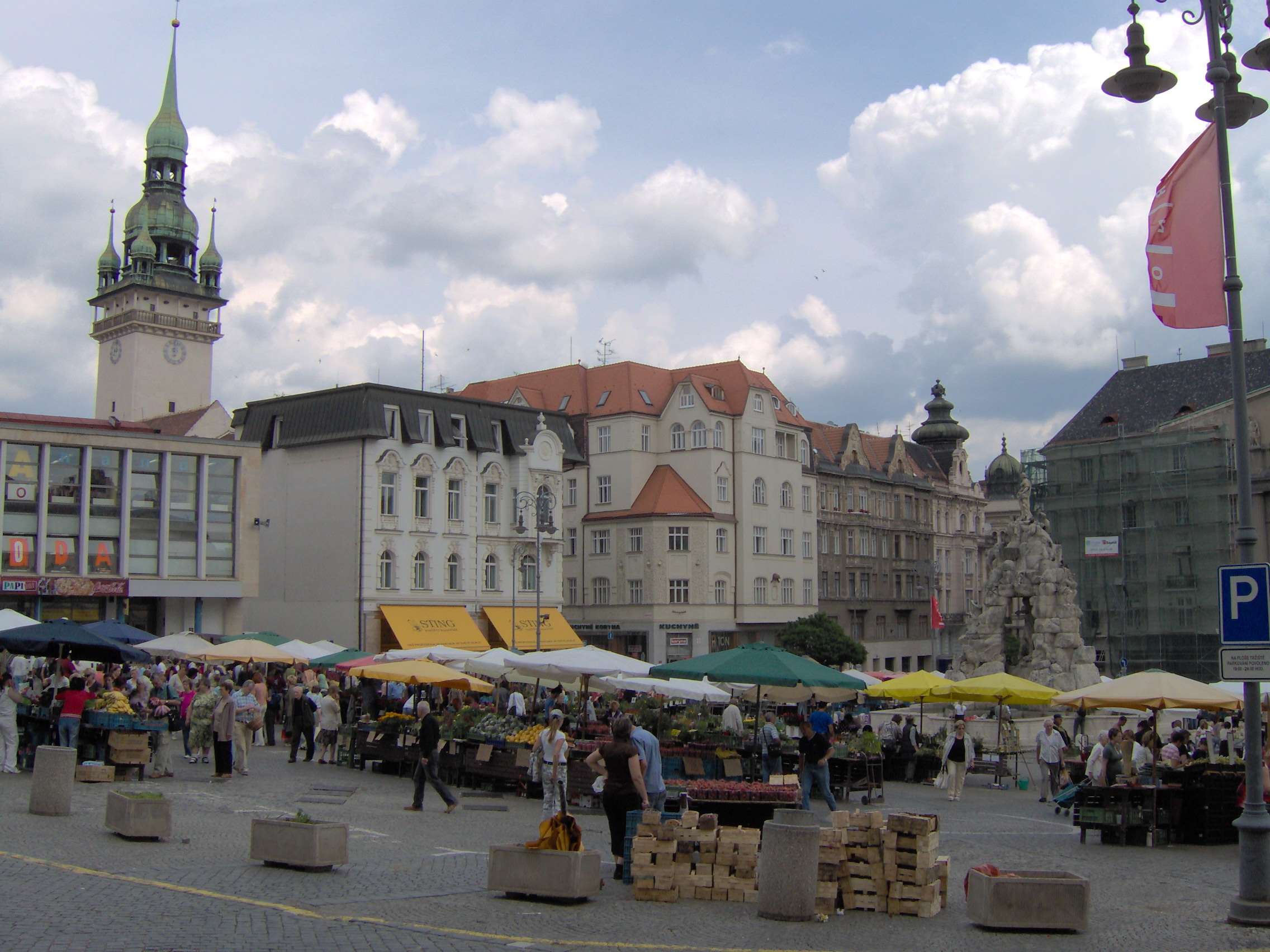 Zelný trh v Brně